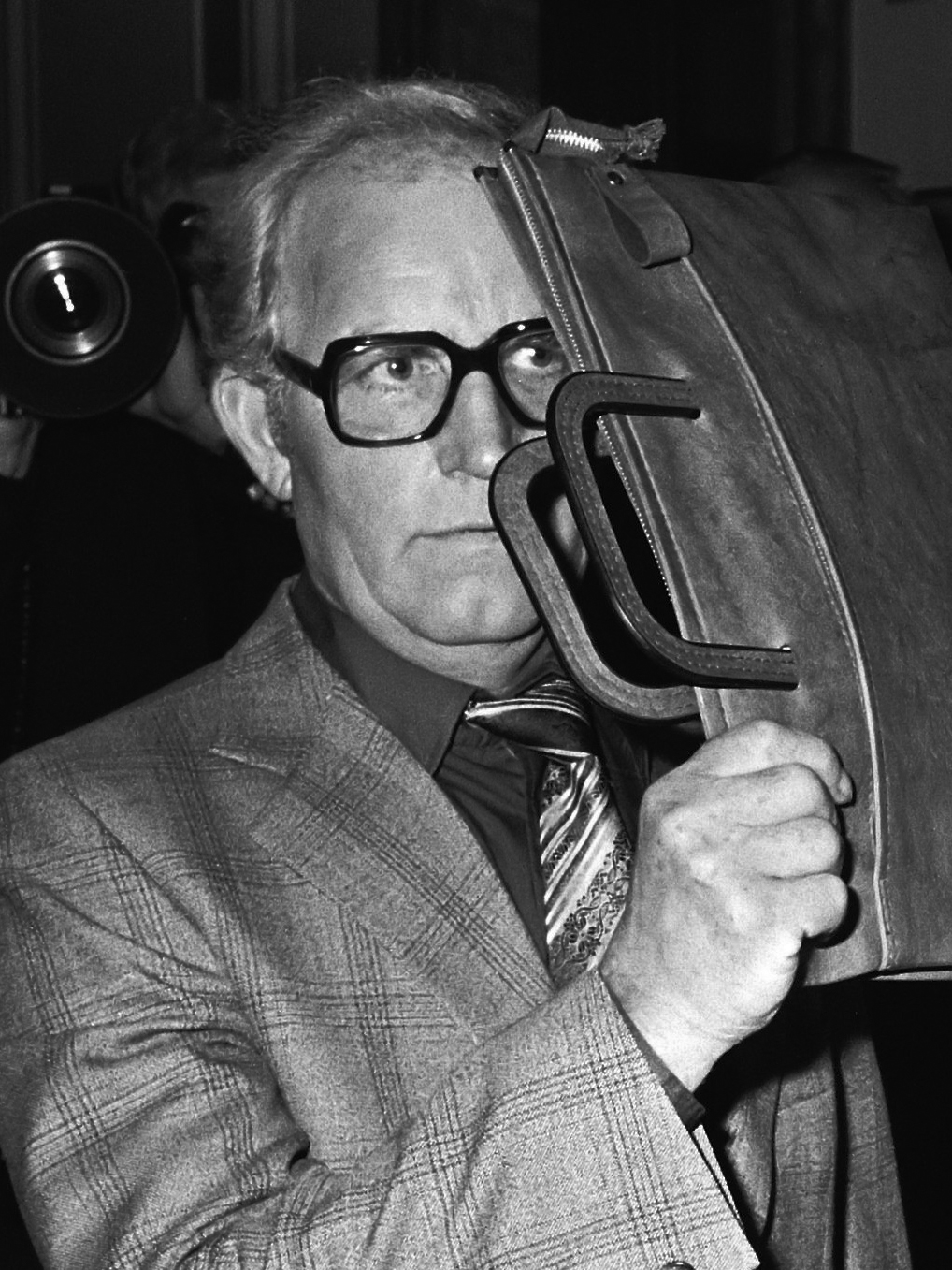 Aankomst van de verdachte Siert Bruins in het gerechtsgebouw in Hagen in West Duitsland; hij houdt een tas voor zijn gezicht.